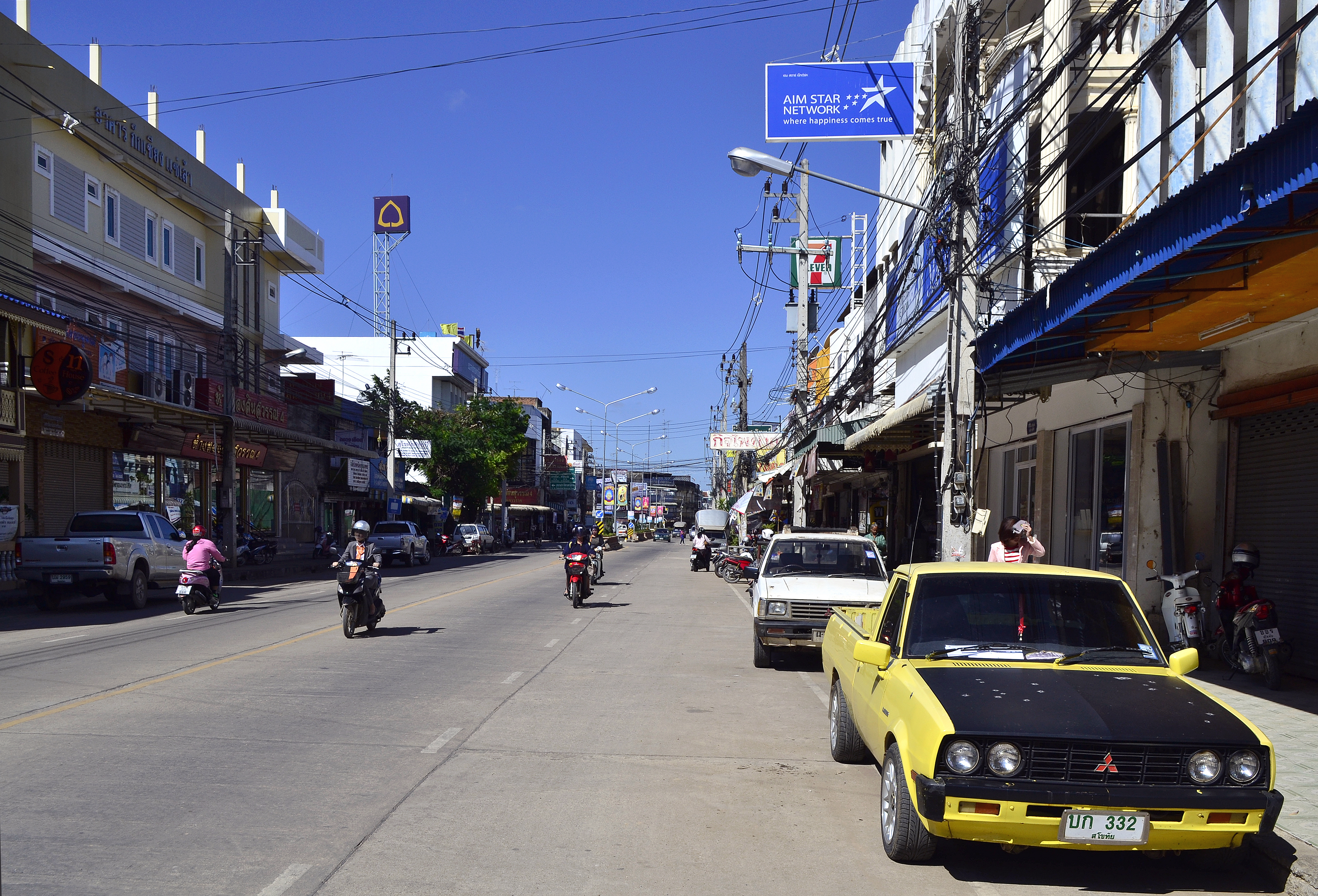 Straßenszene in Sukhothai